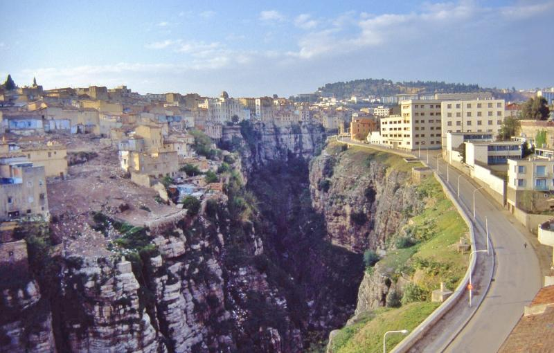 Les gorges, Constantine, Algeria